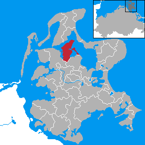 Neuenkirchen, Landkreis Rügen, Mecklenburg-Vorpommern